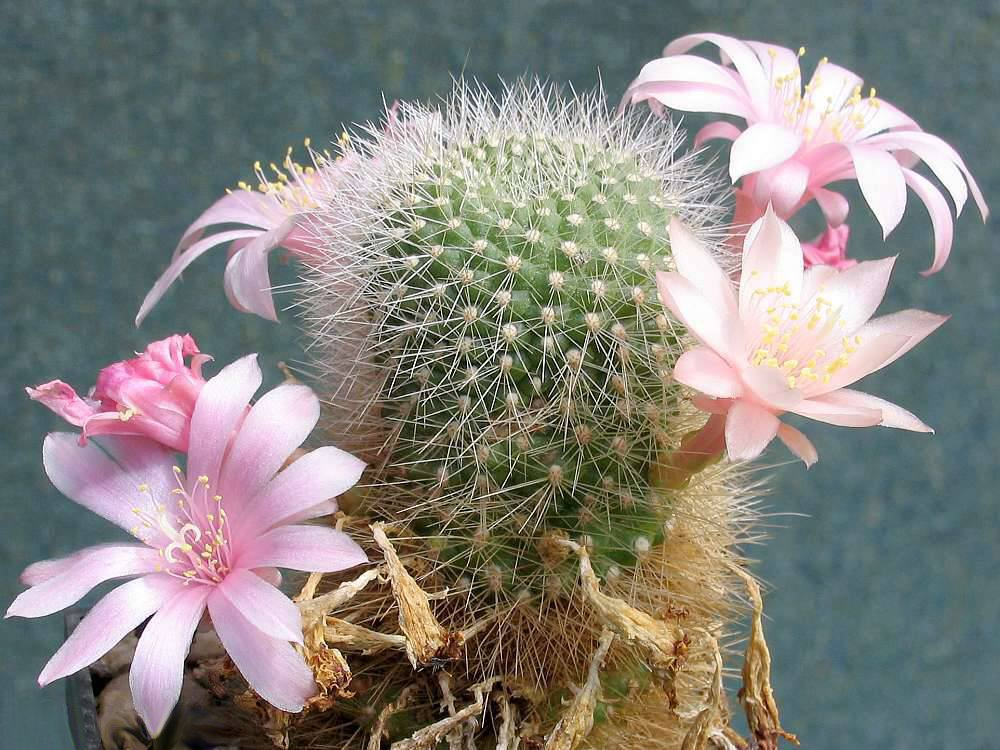 Rebutia kariusiana Wessner